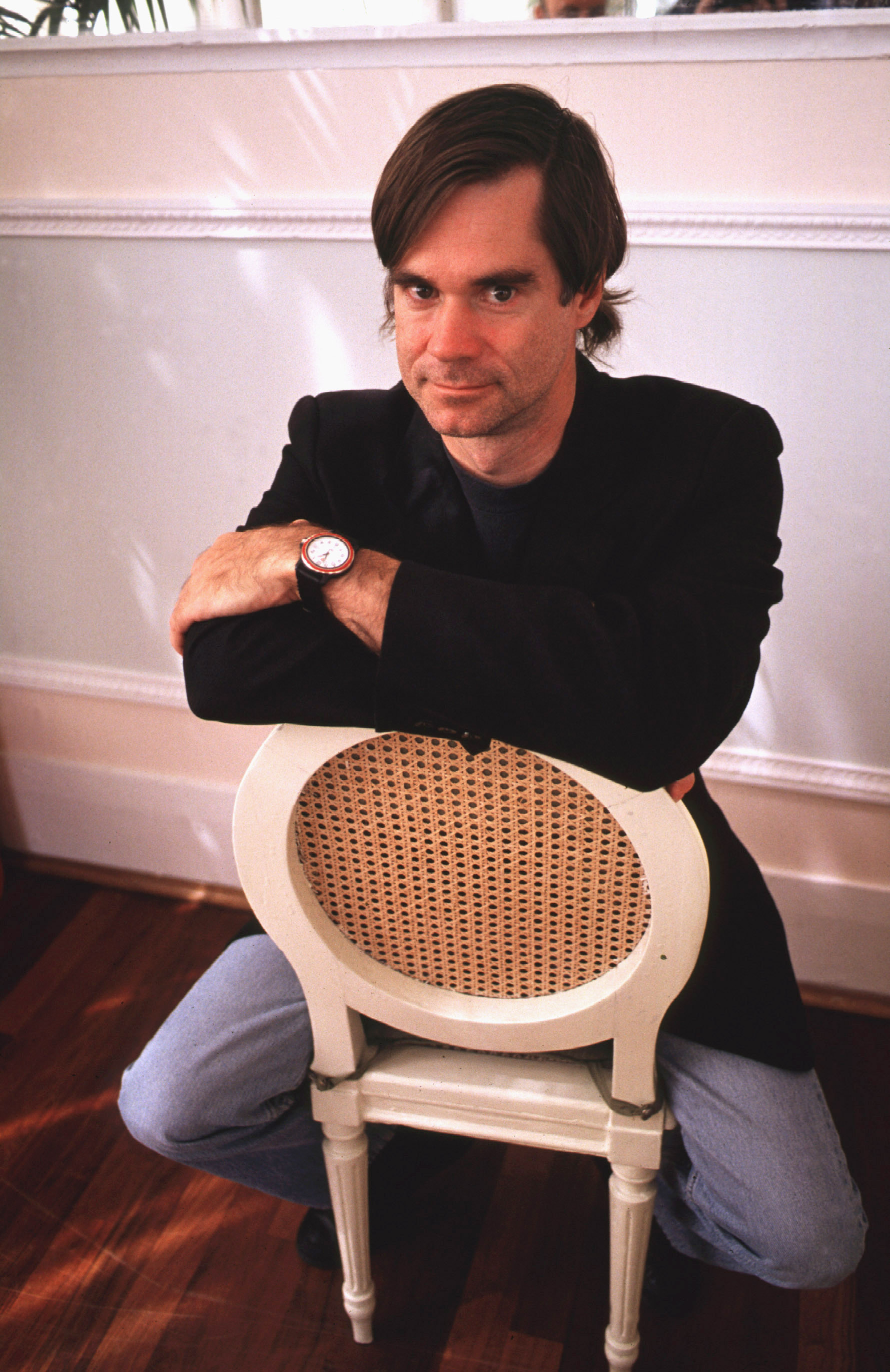 Il regista statunitense Gus Van Sant alla Mostra del cinema di Venezia del 1993